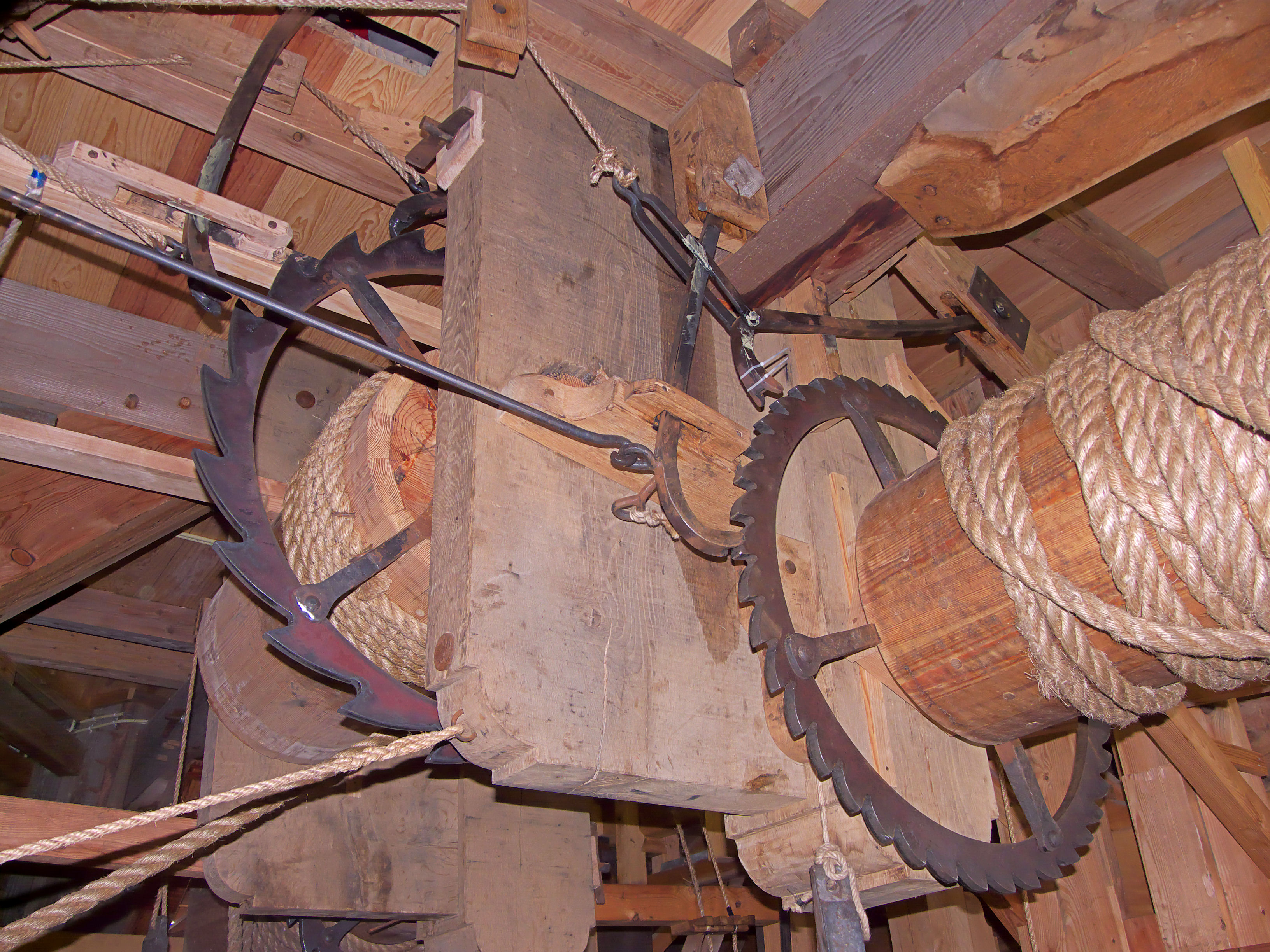 Molen Het Jonge Schaap, winderij met krabbelrad